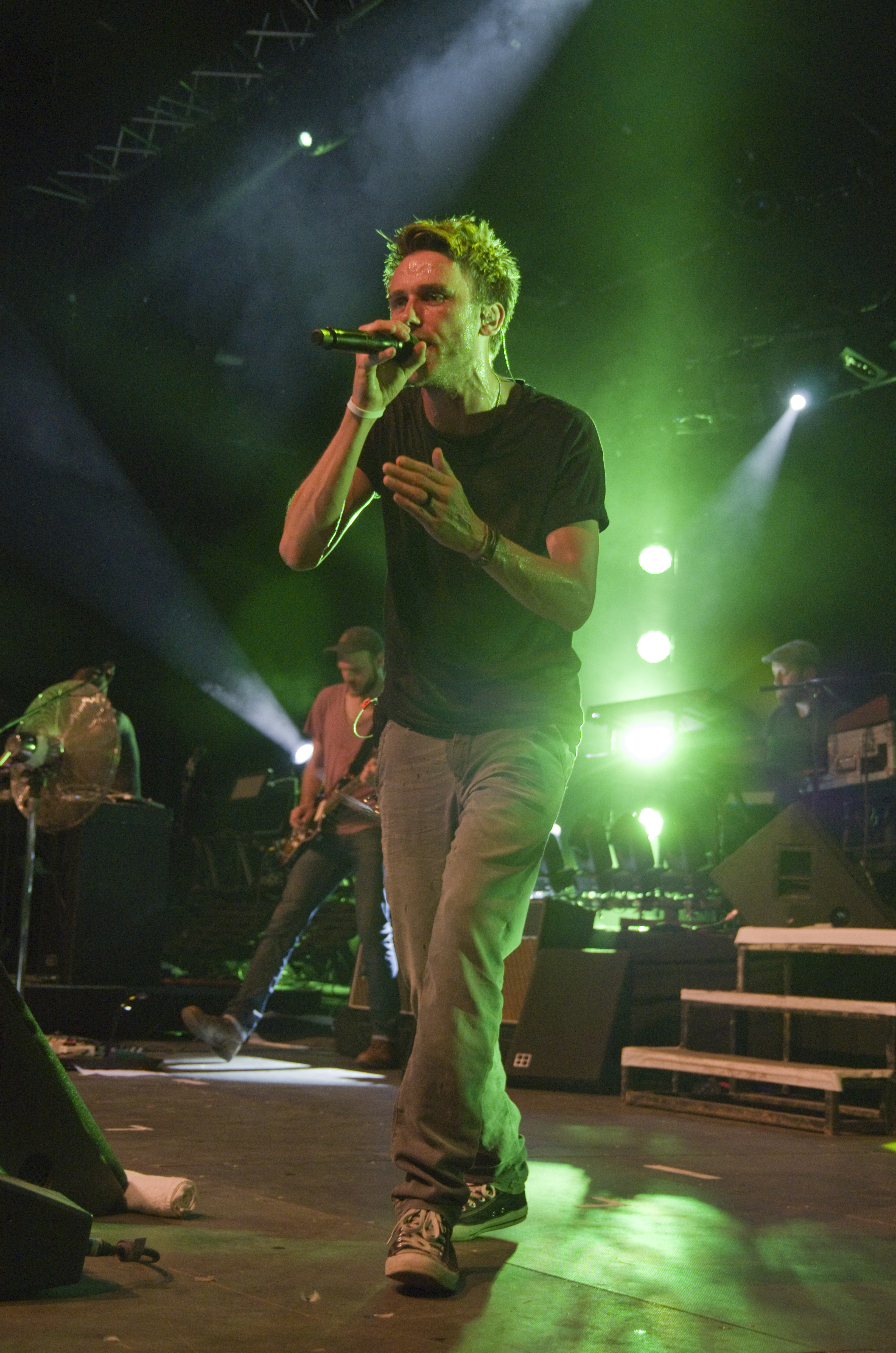 Zelt-Musik-Festival 2015 11.07.2015, Clueso